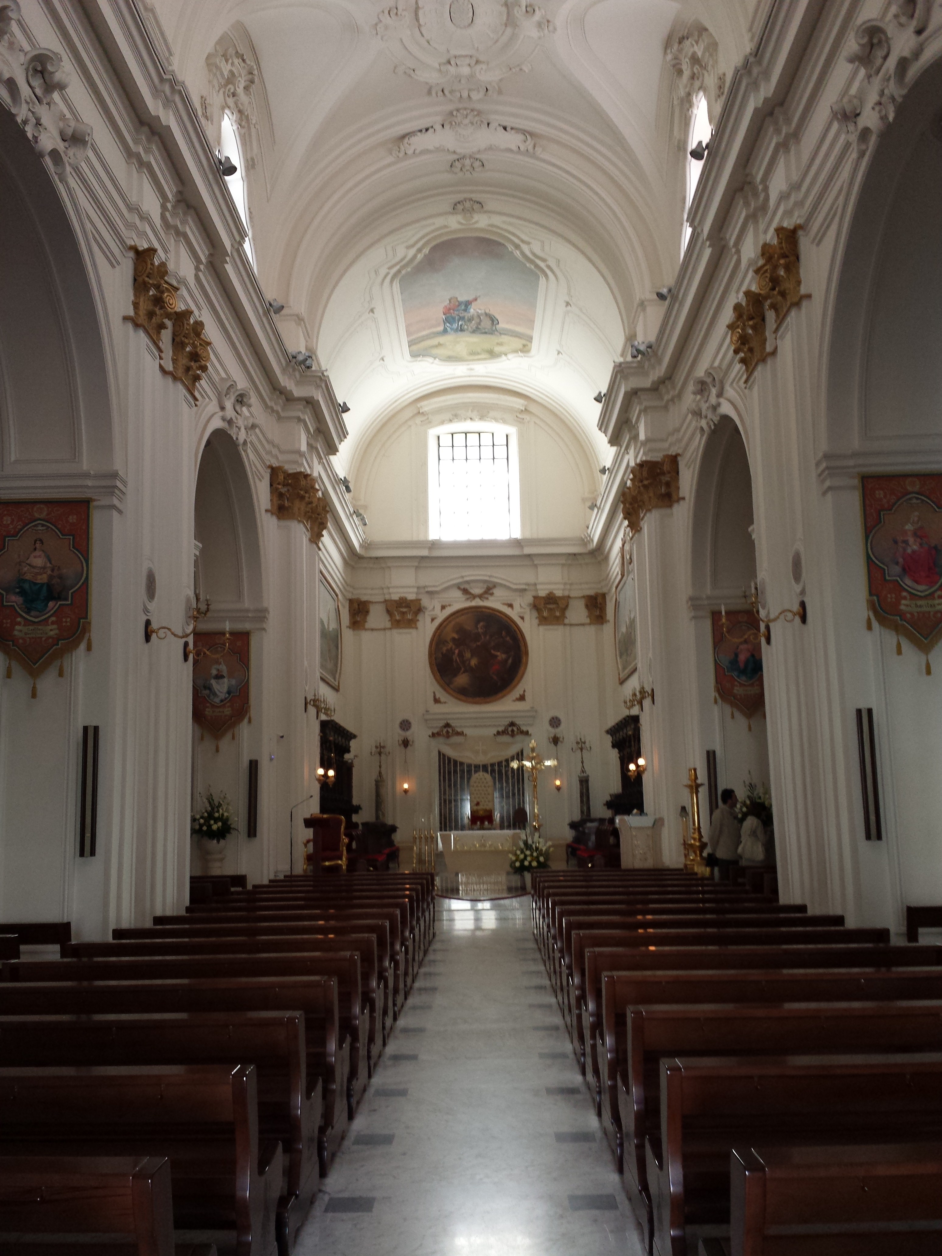 Interno della cattedrale di Nocera Inferiore